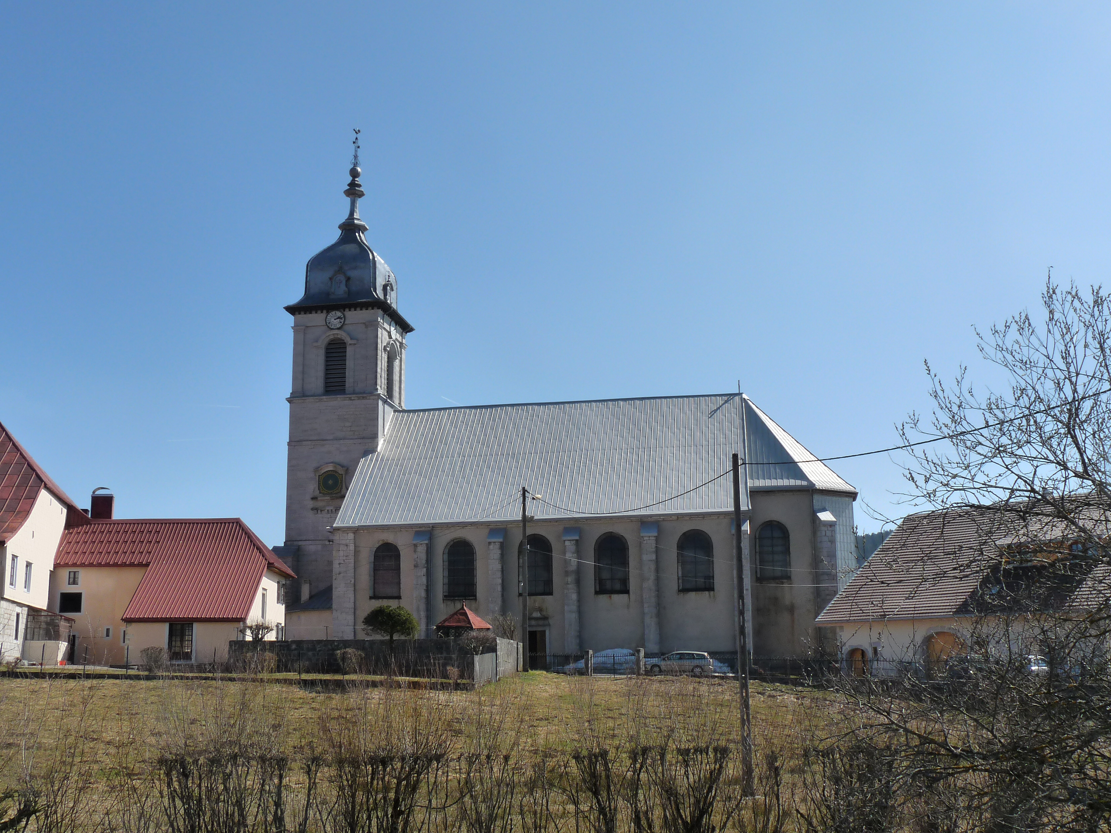 Église de l'Assomption de Mouthe (Doubs)